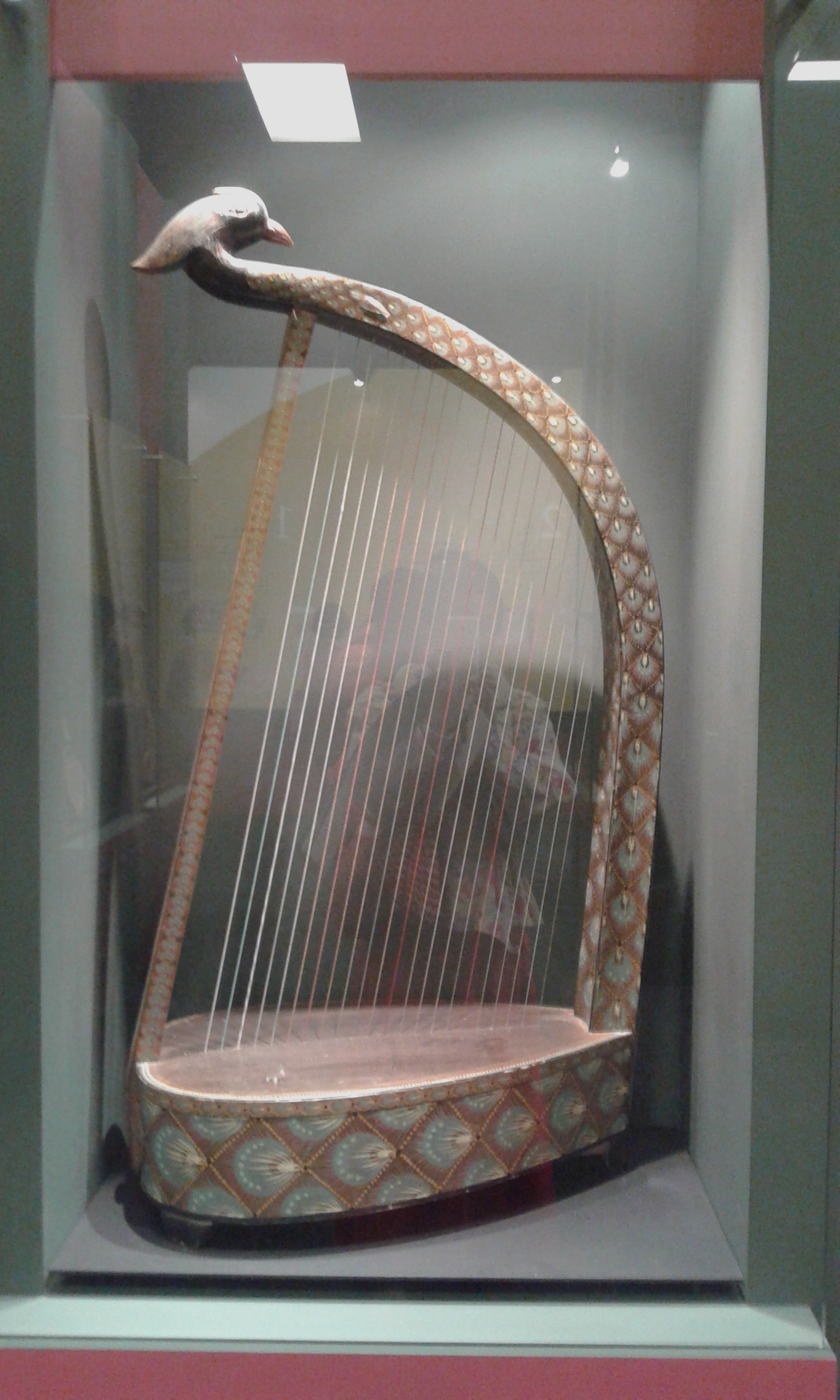 中文（香港）: 鳳首箜篌（唐代）